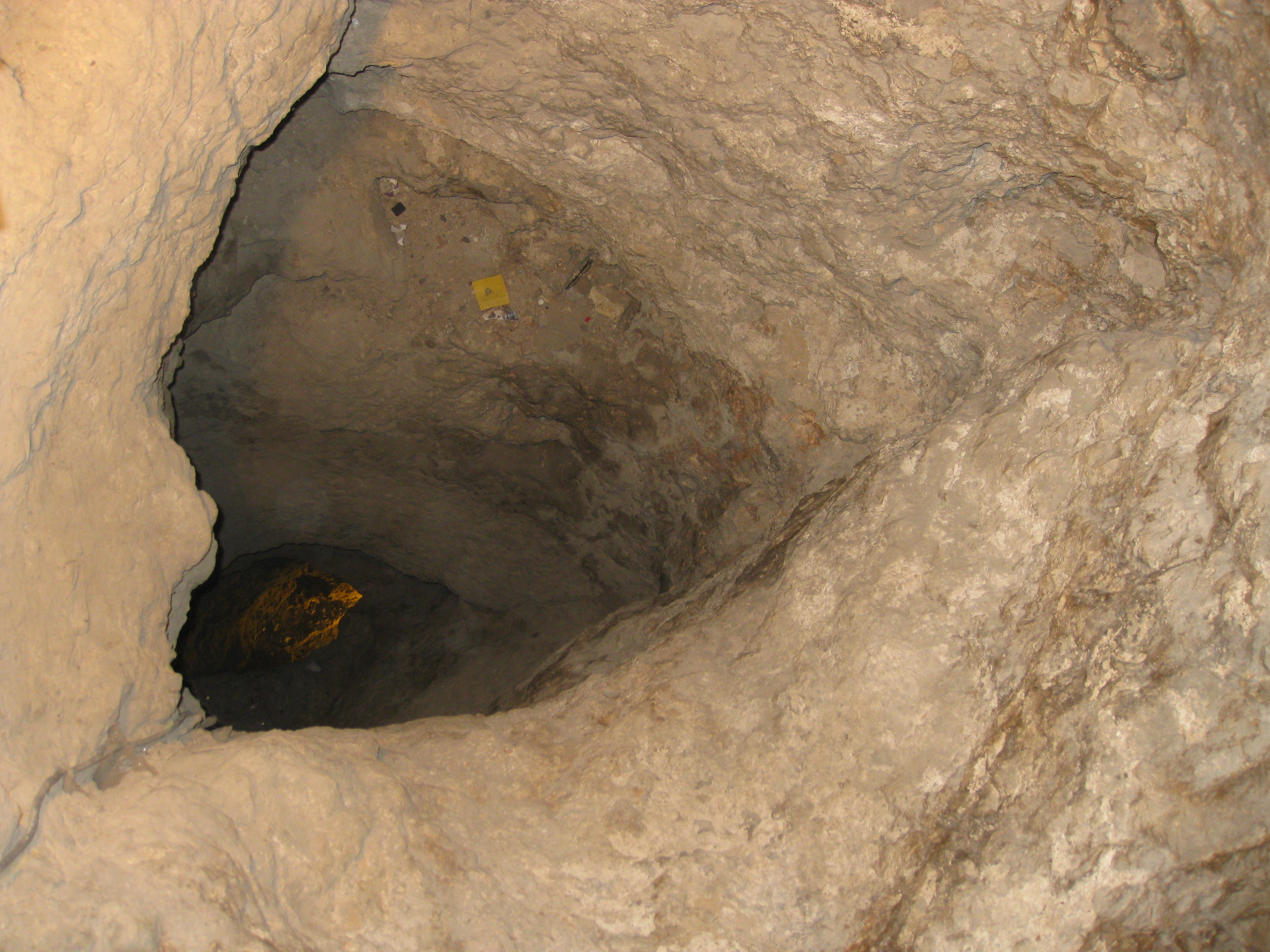 Warren's Shaft פיר וורן